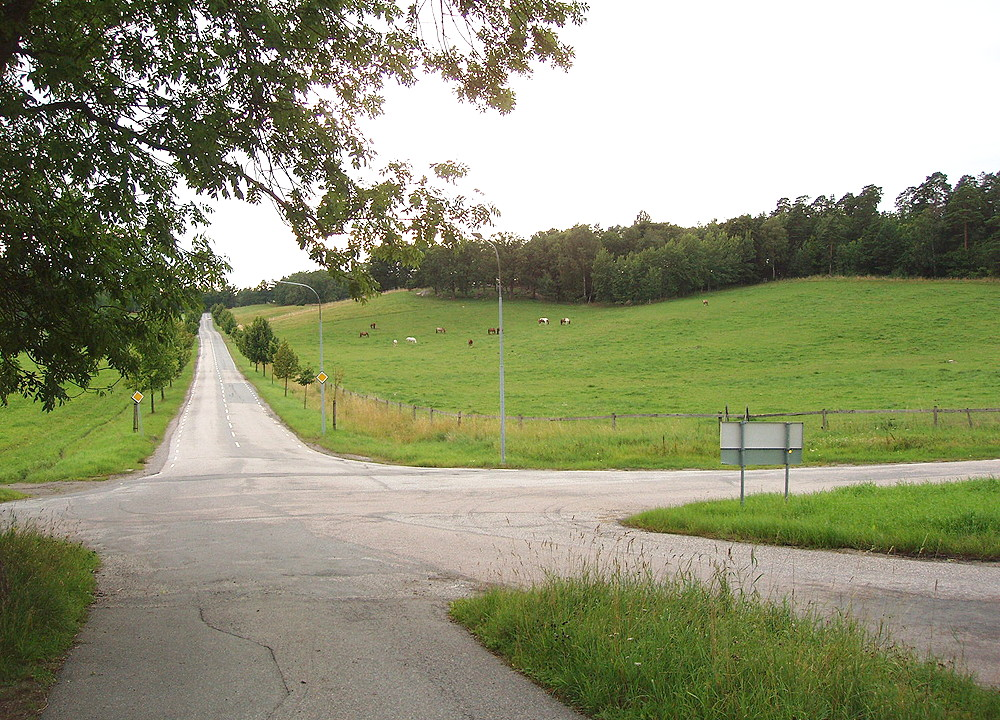 Ängarna vid Elfviks gård, Lidingö, Sverige. Vy mot väster norr om Elfviksvägen. (The open fields at Elfviks farm, Lidingö, Sweden. View towards west, north of Elfviks road).